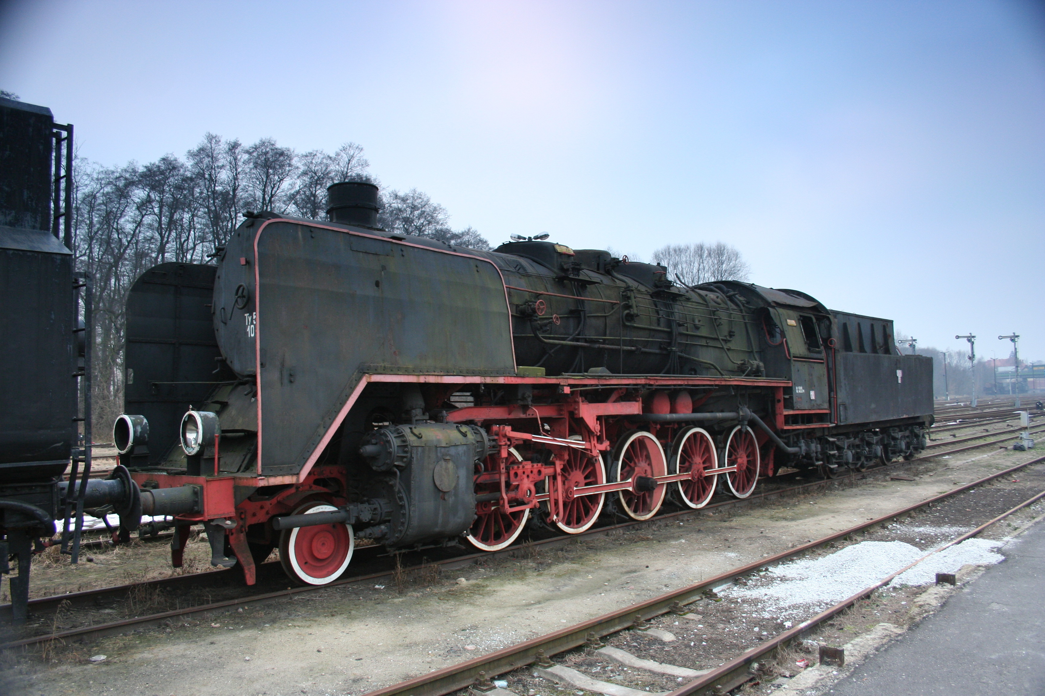 Lokomotywa Ty5-10 - eksponat w skansenie w Wolsztynie.